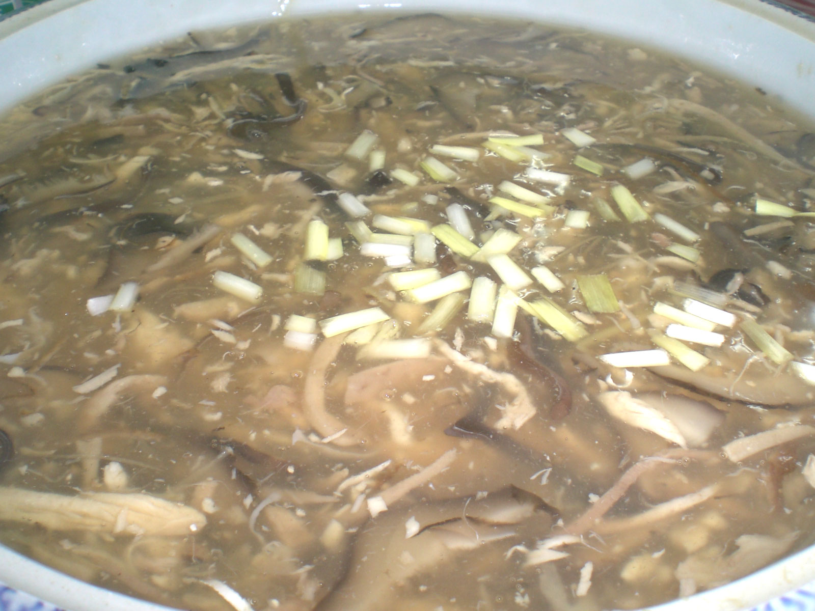 太史五蛇羹是廣東食品, 蛇宴的主角, 主要材料是蛇肉